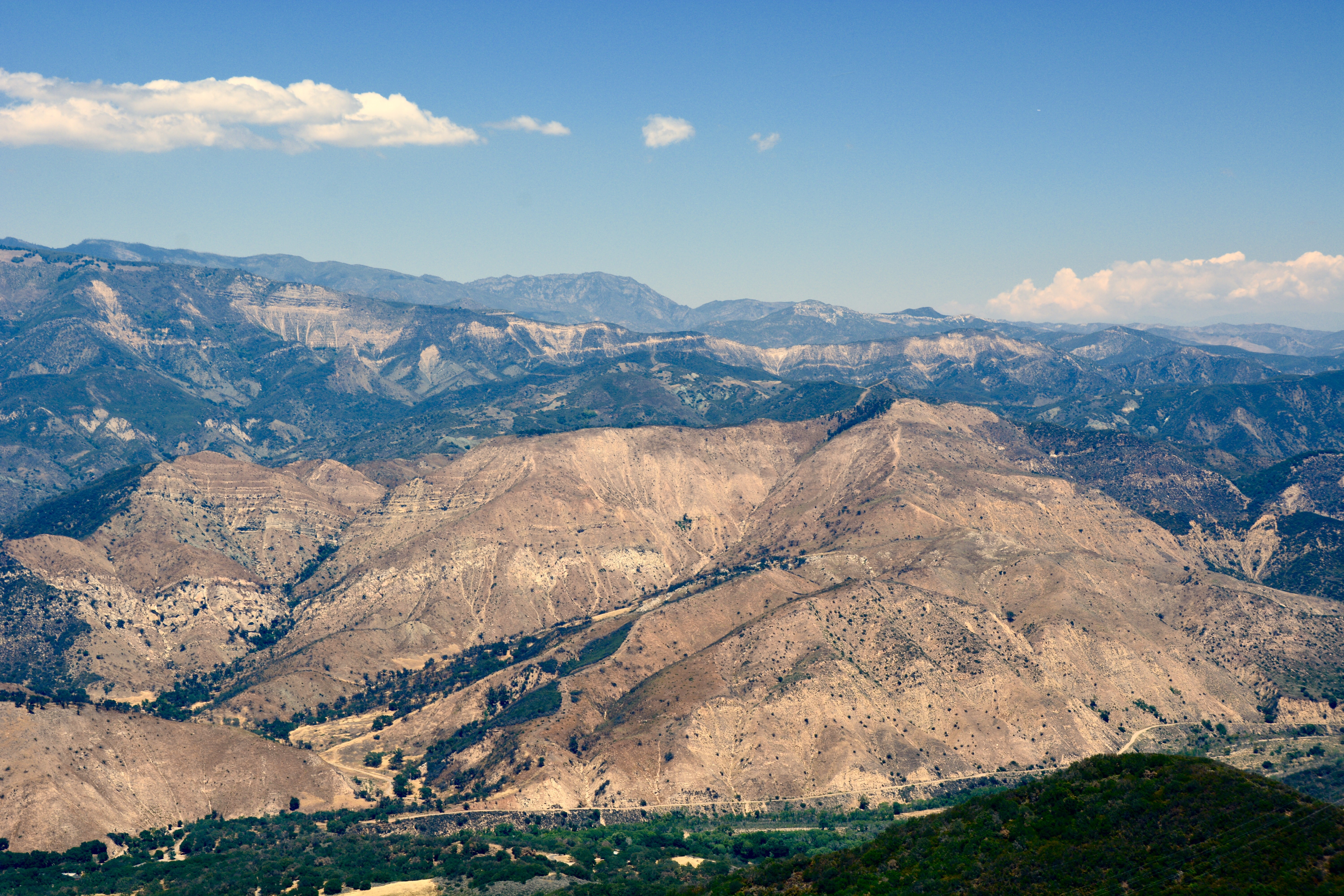 San Rafael Wilderness